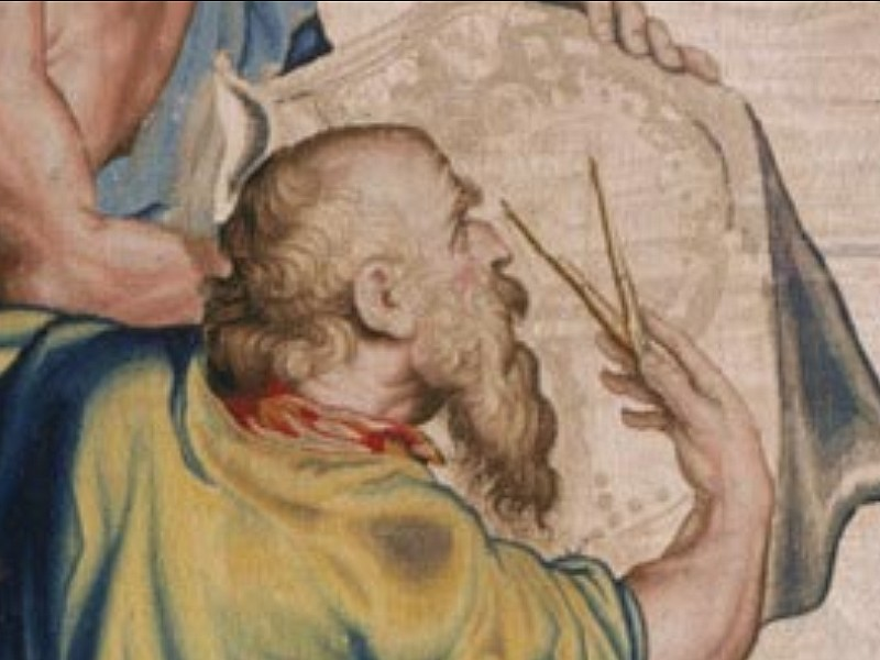 Salomon de Brosse pourrait être l'architecte représenté dans cette tapisserie de Rubens. Thèse soutenue en 1965 par John Coolidge (1913-1995) de l'université d'Harvard, USA. voir A Portrait by Rubens of Salomon de Brosse John Coolidge The Journal of the Society of Architectural Historians, Vol. 24, No. 4 (Dec., 1965)